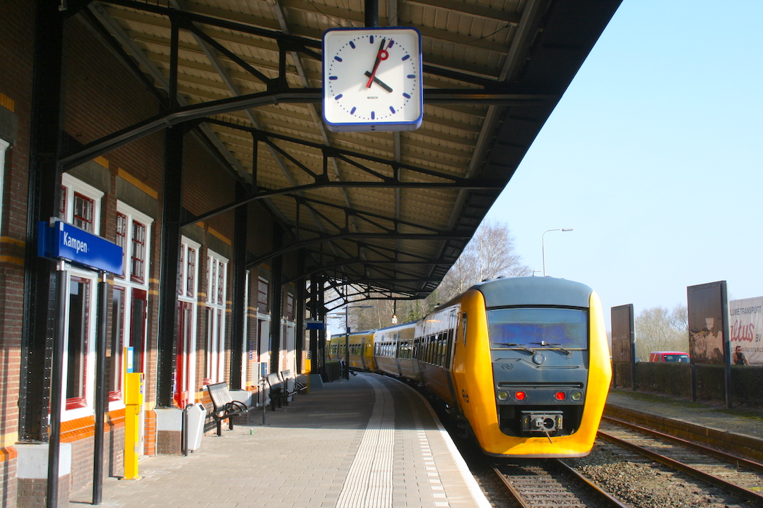 DM'90 vertrekt uit Kampen naar Zwolle; 23 maart 2012. Foto: Erik Swierstra.